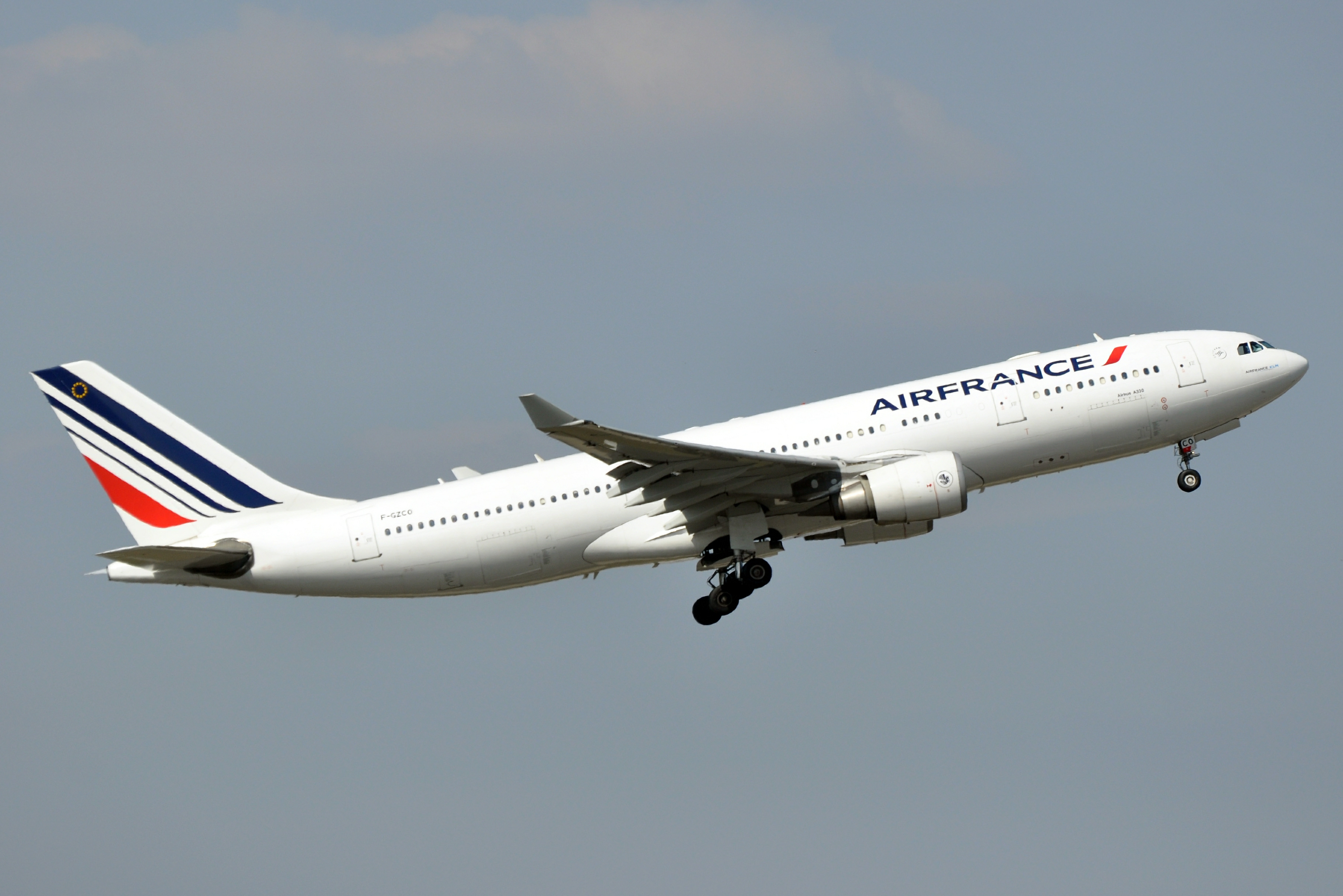 MSN 657 A330-203 AIR FRANCE CDG